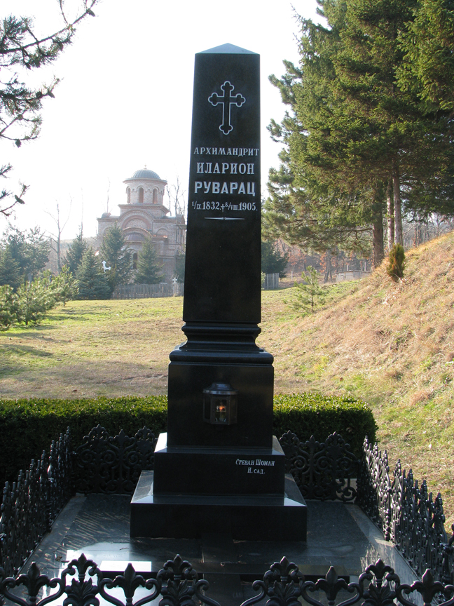 Grob Ilariona Ruvarca